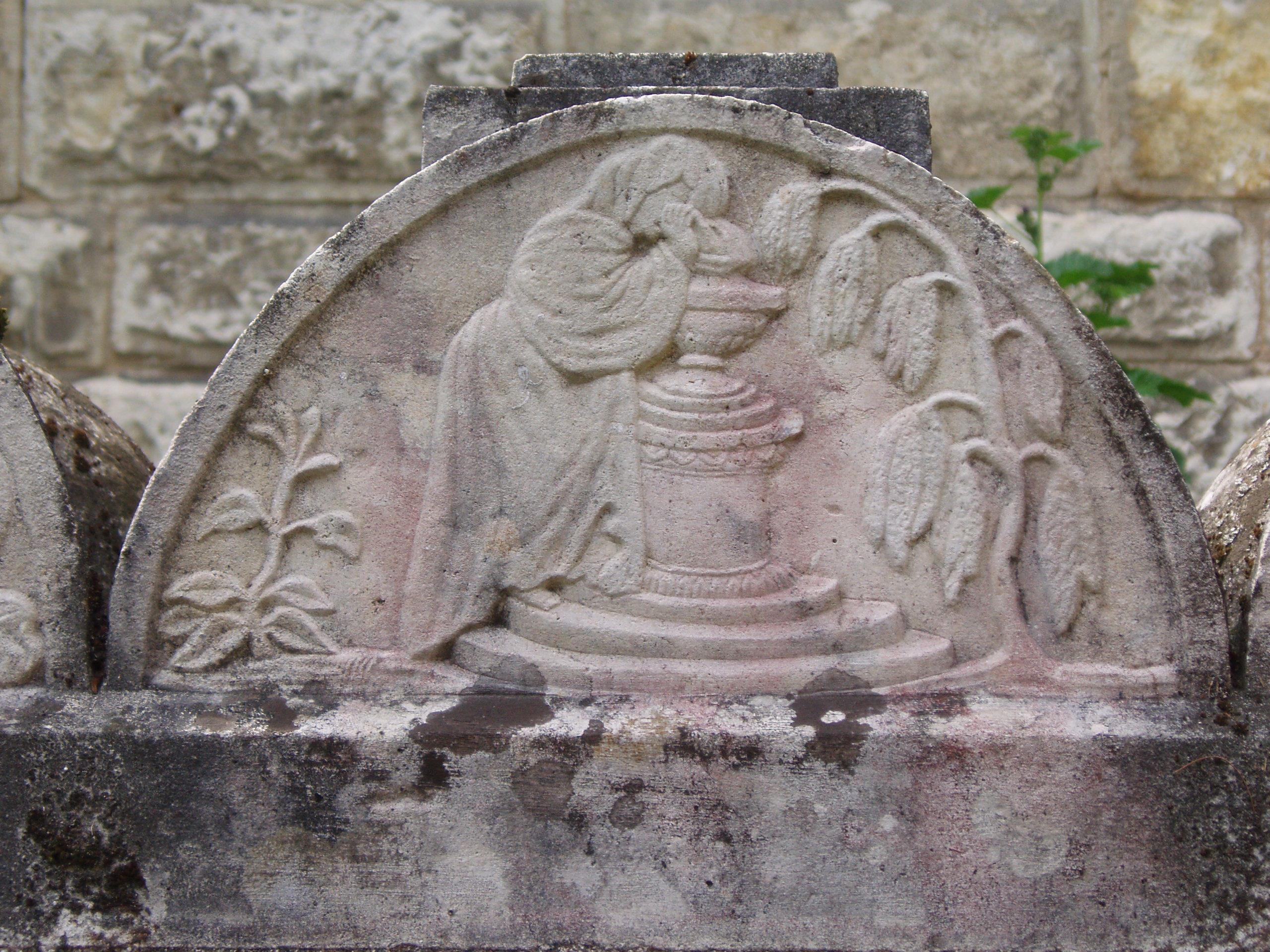 Grabstein-Detail Solnhofen Pfarrgarten